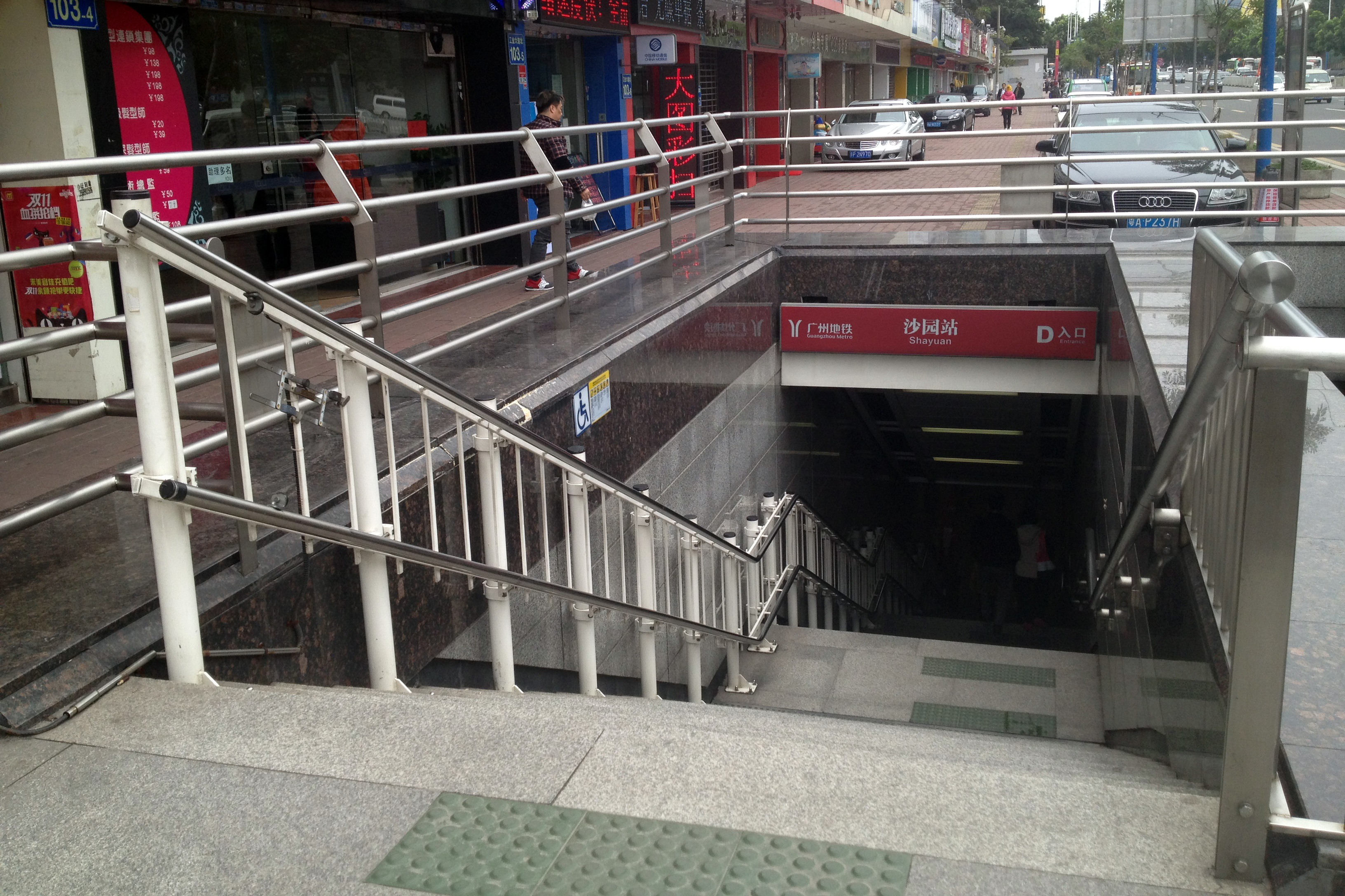 广州地铁沙园站D出入口